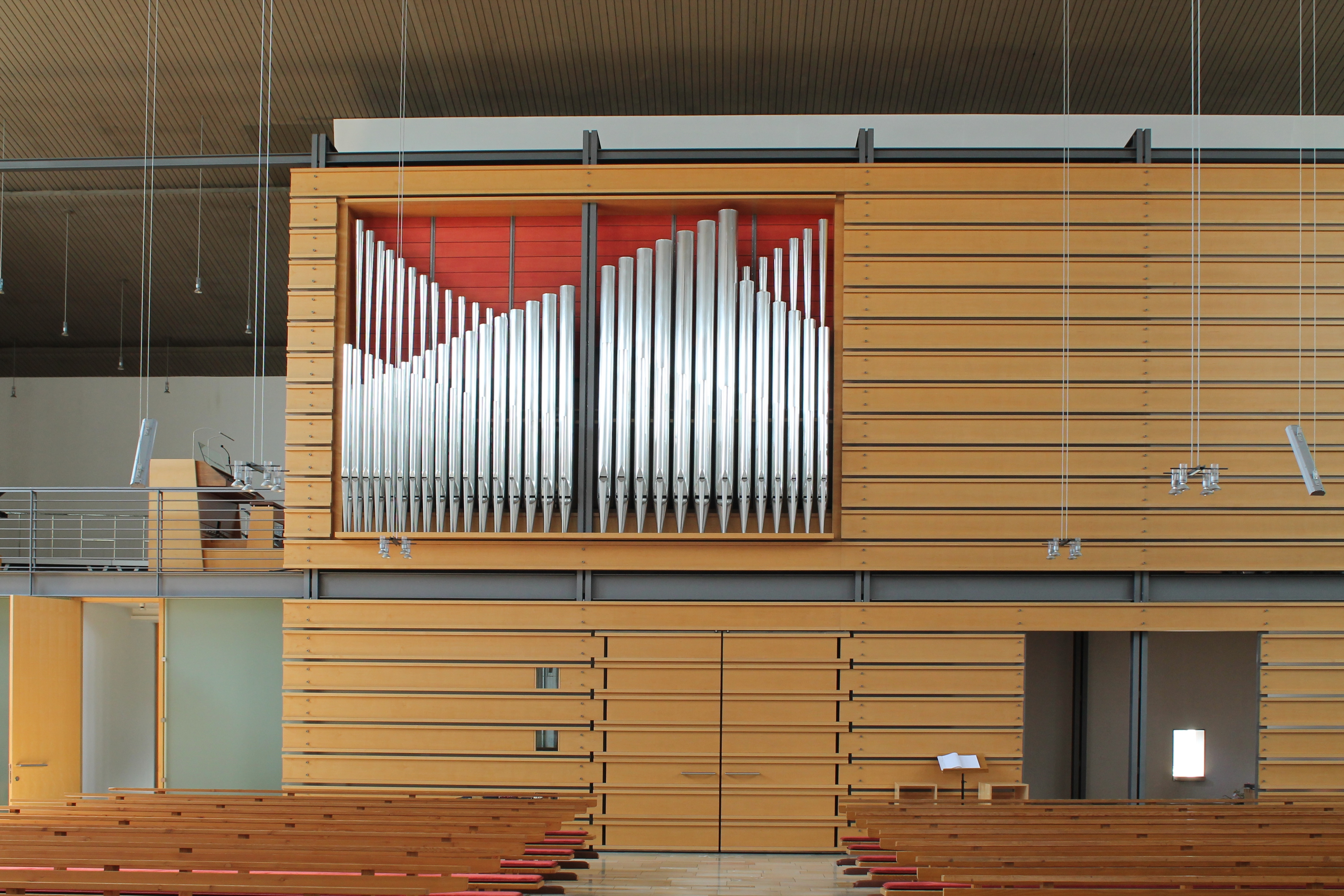 Orgel von Heilig Kreus in Dachau (1999, Anton Staller, II/27)